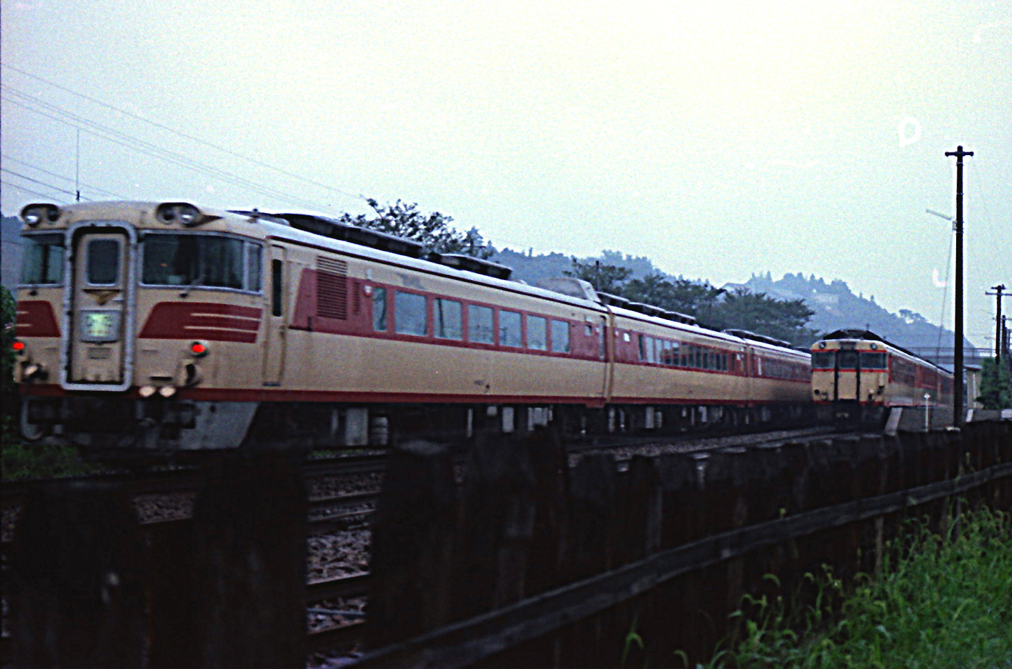 特急ひだ号と交換するのりくら4号